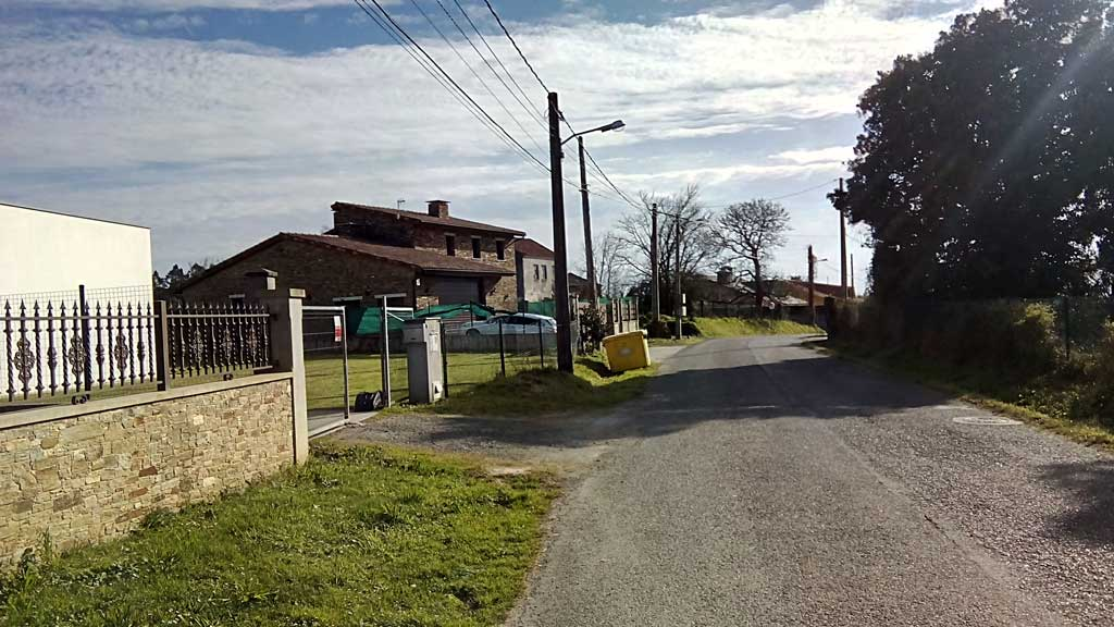 Vista da Venda, Narón.